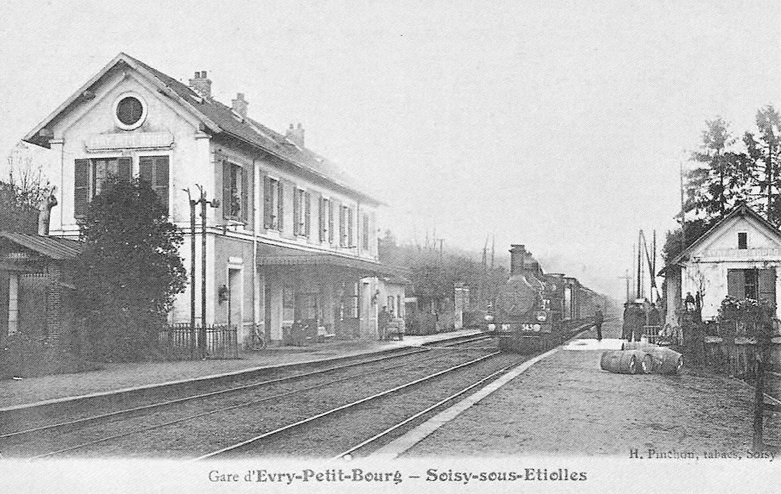 La gare d'Evry (Essonne, France), au début du XX° siècle.